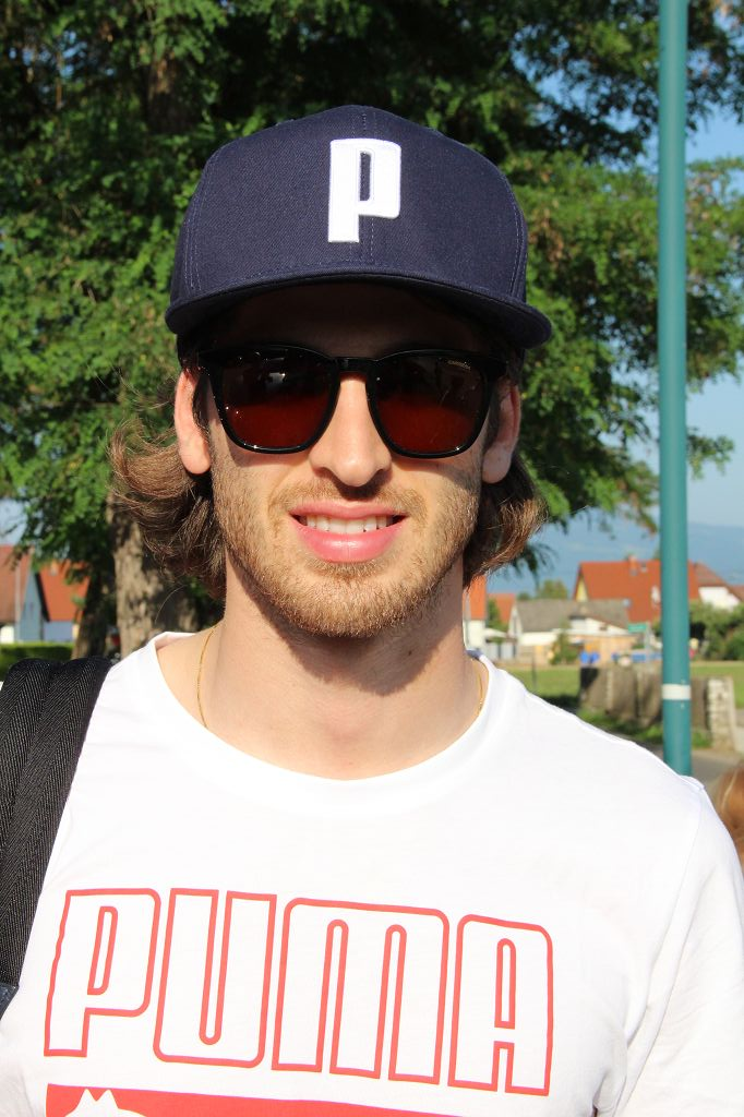 Formula 1 2019 / Schloss Gabelhofen